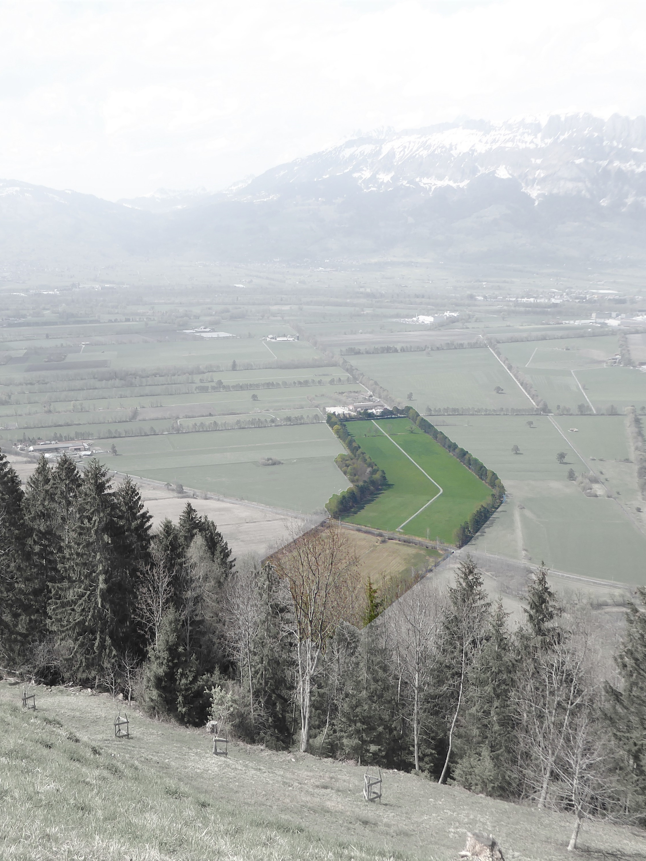 Blick von Planken auf die Rheintalebene mit der Exklave Riet-Äscher (hervorgehoben)